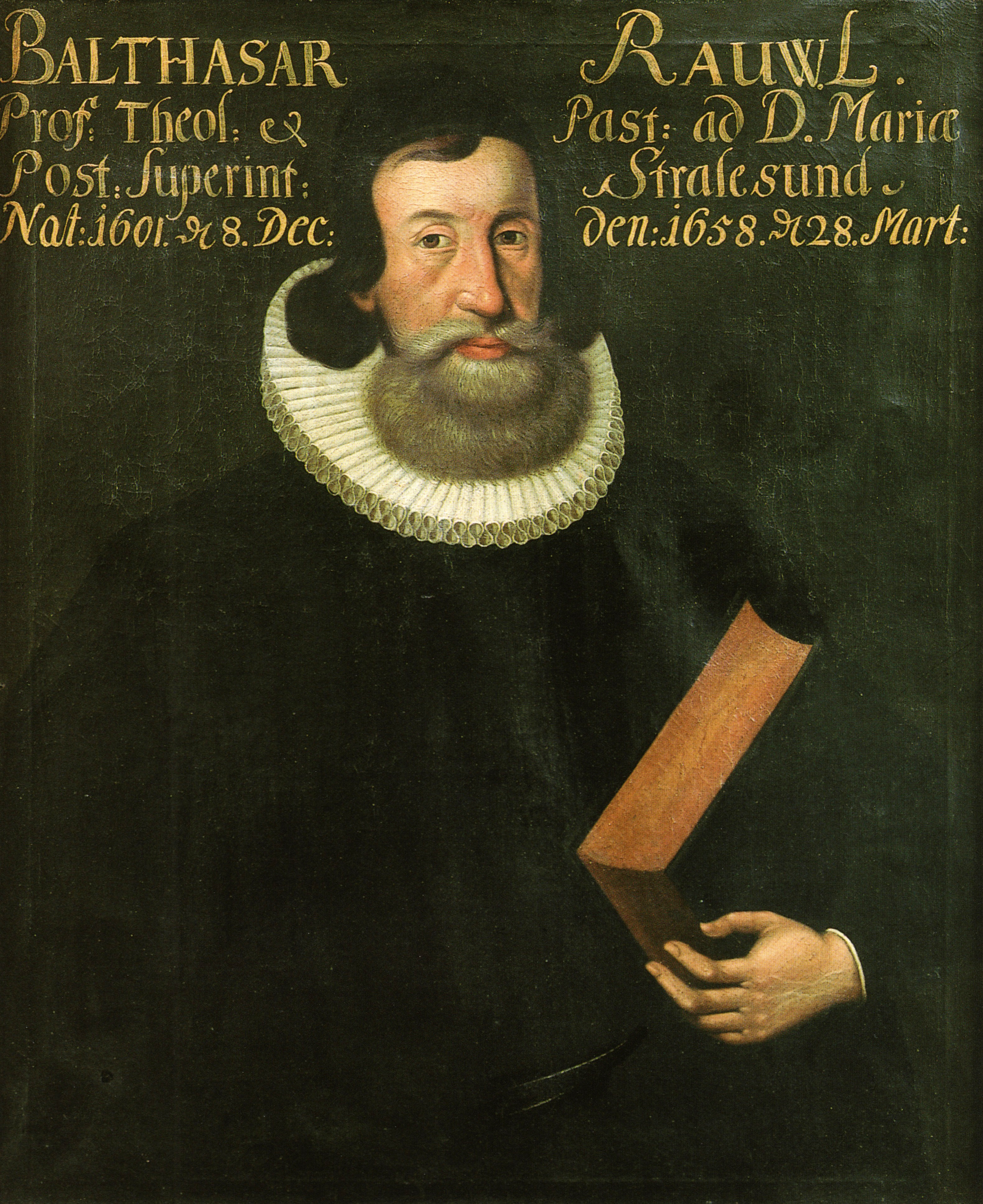 Ölgemälde von Balthasar Rhaw (II.).